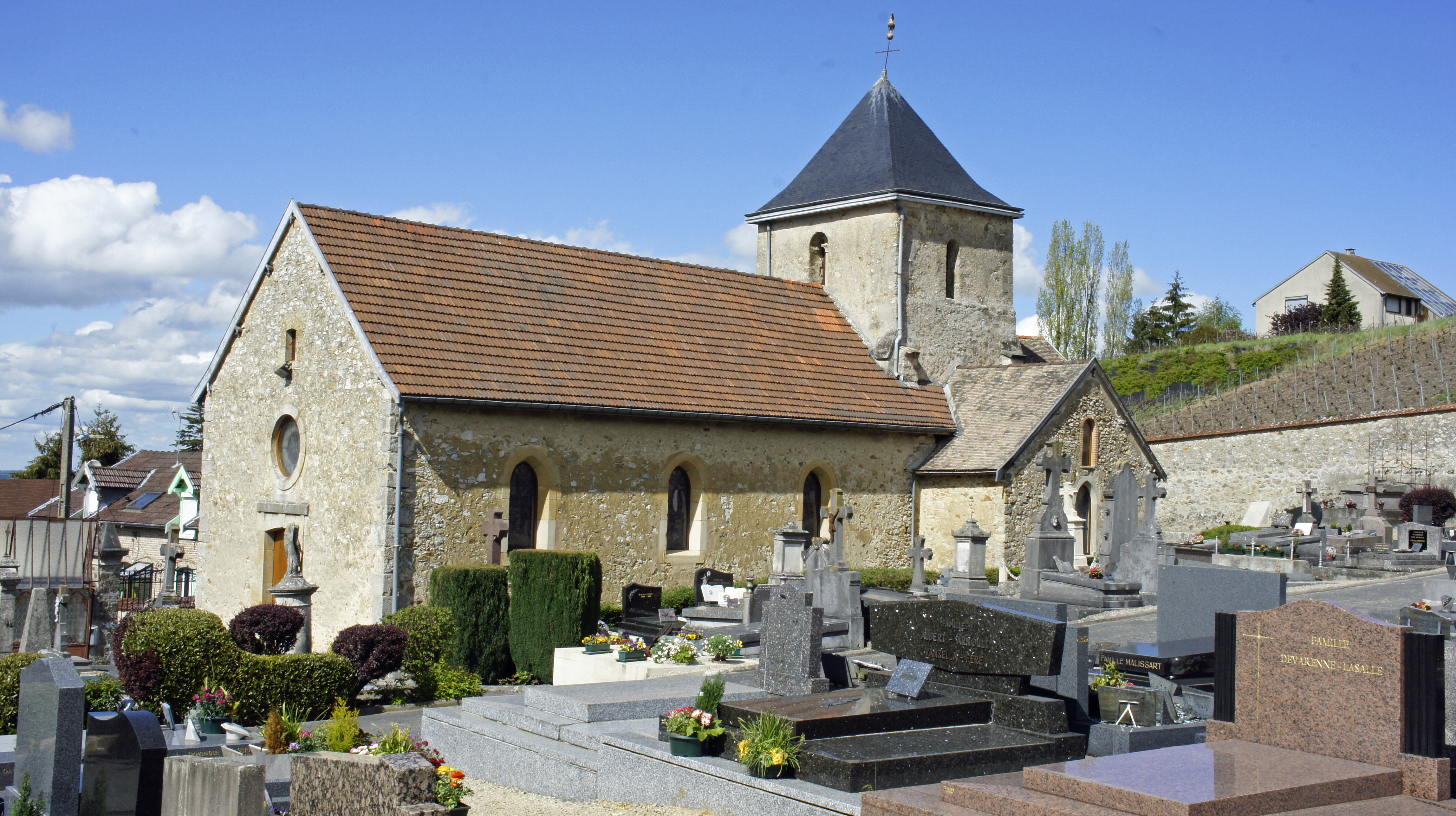 Église de Mailly Champagne entourée de son cimetière.